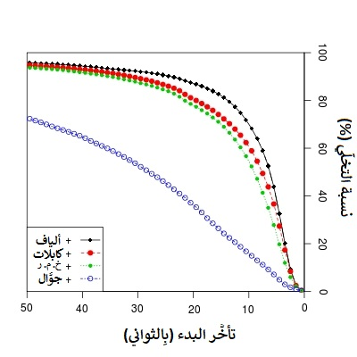 رسمٌ بيانيٌّ يوضح أنَّ مُستخدمي الإنترنت المُتمتعين بِسُرعة استصال أكبر يهجرون الشابكة بِشكلٍ أسرع.